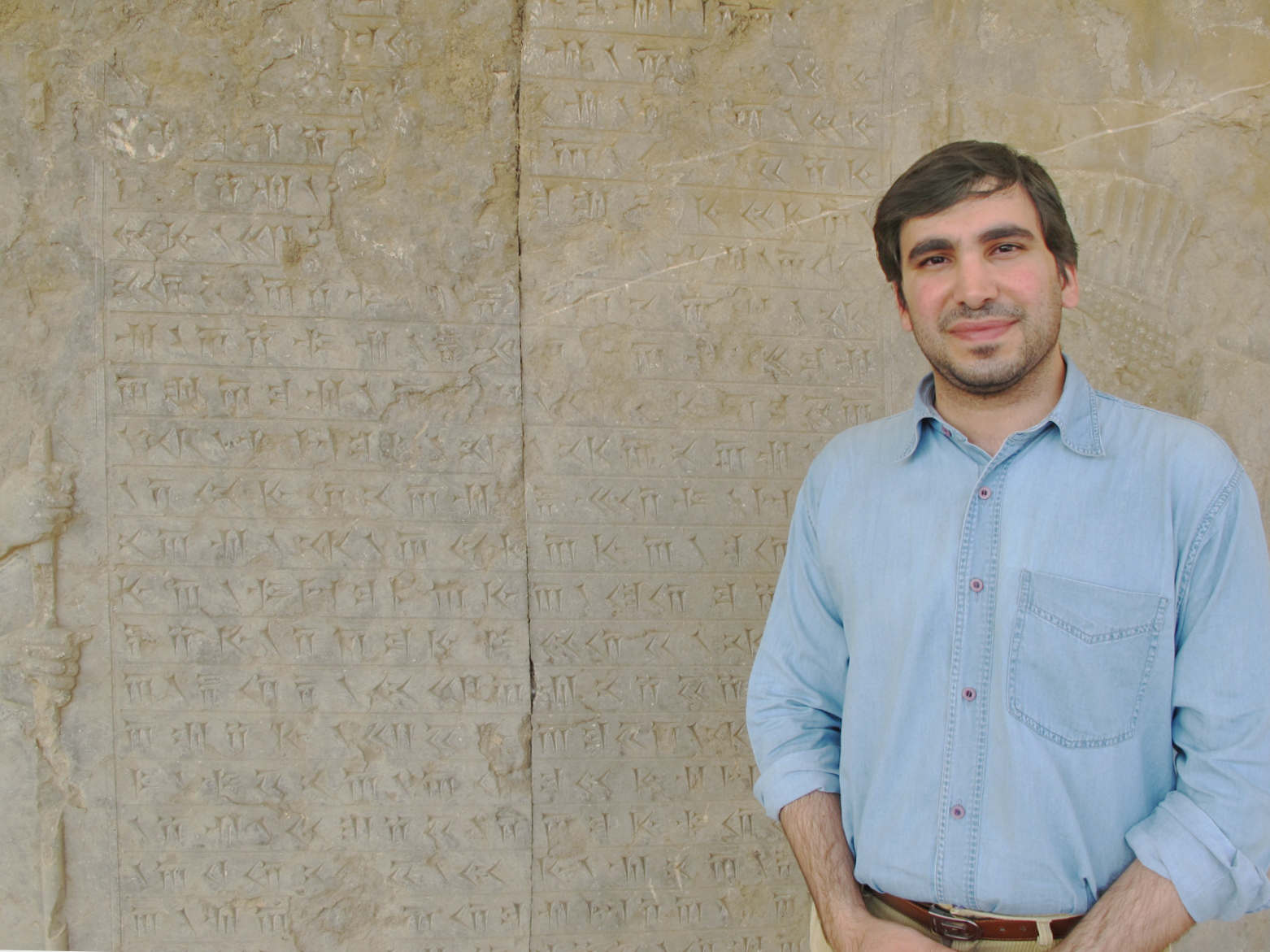 آوی باخنهایمر